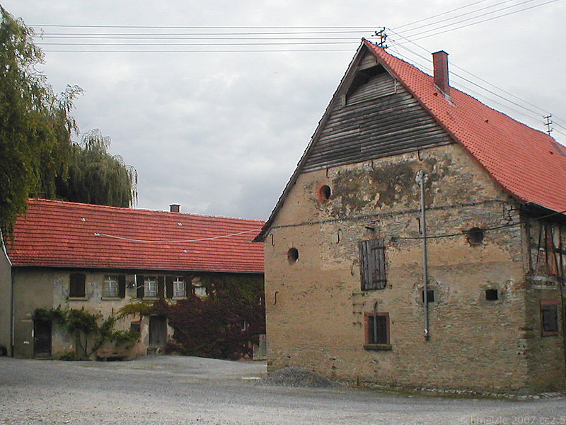 Gutshof (ehem. Herrensitz) in Meckesheim-Mönchzell, Baden-Württemberg, Deutschland